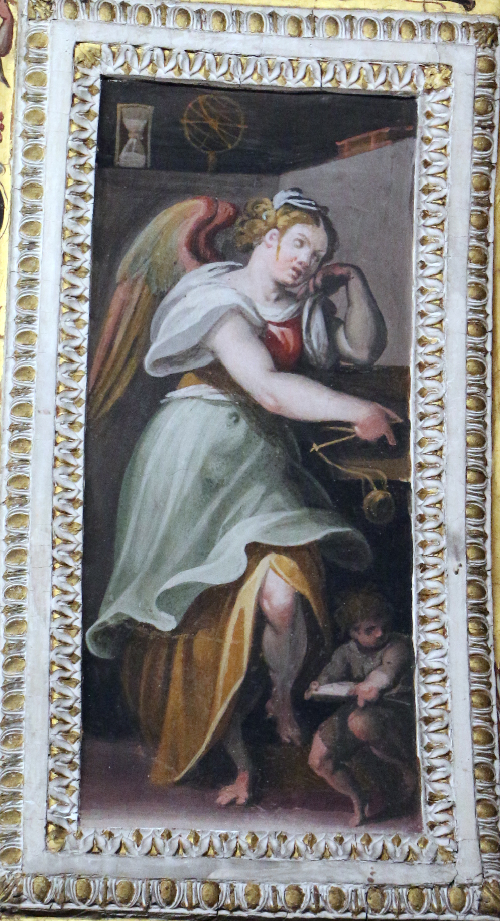 Allegoria del temperamento Malinconico secondo la dottrina dei quattro umori, affresco di Jacopo Zucchi e del Poppi sul soffitto dello studiolo di Francesco I nel Palazzo Vecchio a Firenze